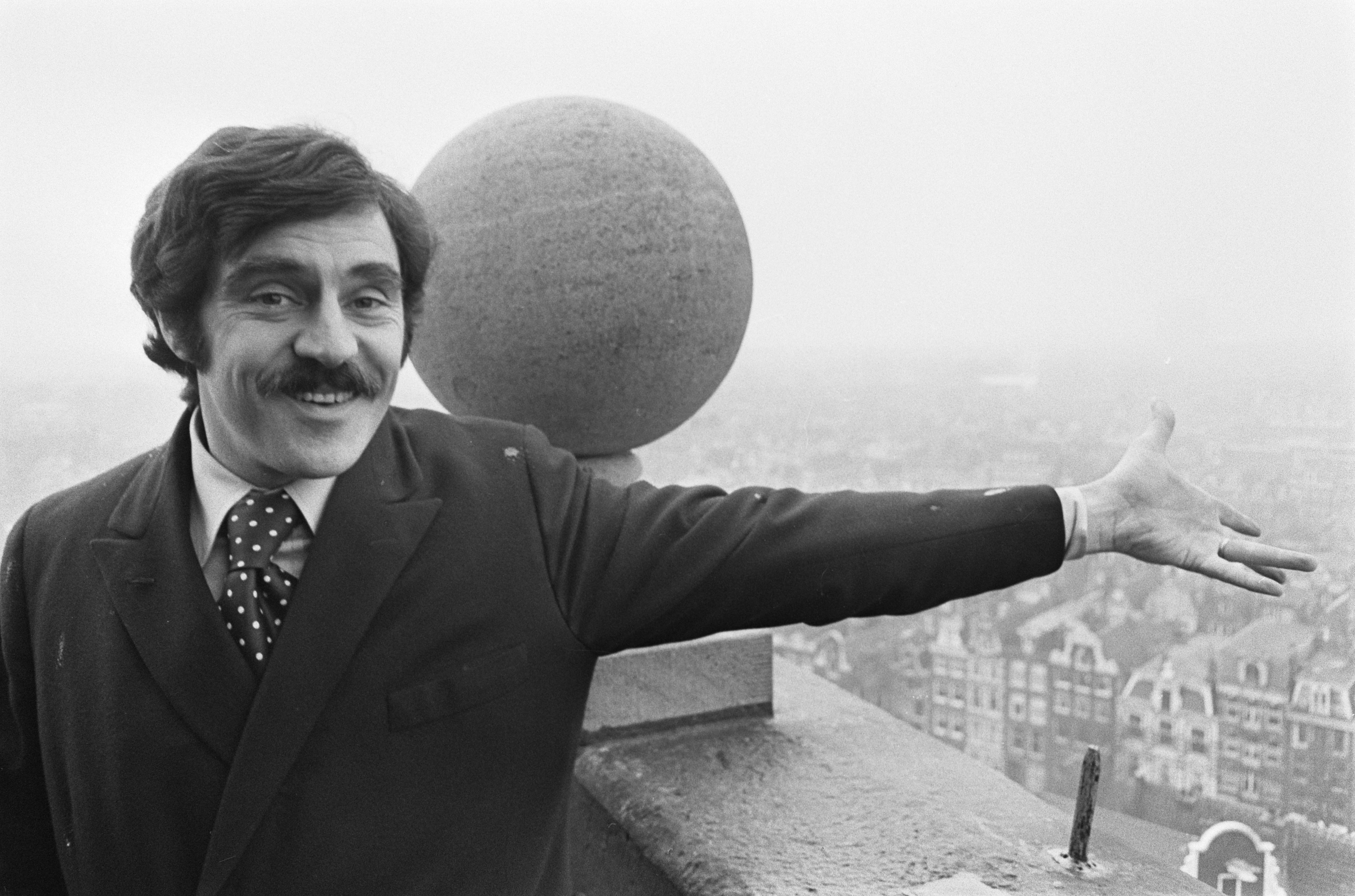 Collectie / Archief : Fotocollectie Anefo Reportage / Serie : [ onbekend ] Beschrijving : Anthony Newley in Amsterdam, hoofrol in Doctor Doolittle Datum : 14 december 1967 Locatie : Amsterdam, Noord-Holland Fotograaf : Kroon, Ron / Anefo Auteursrechthebbende : Nationaal Archief Materiaalsoort : Negatief (zwart/wit) Nummer archiefinventaris : bekijk toegang 2.24.01.05 Bestanddeelnummer : 920-9273